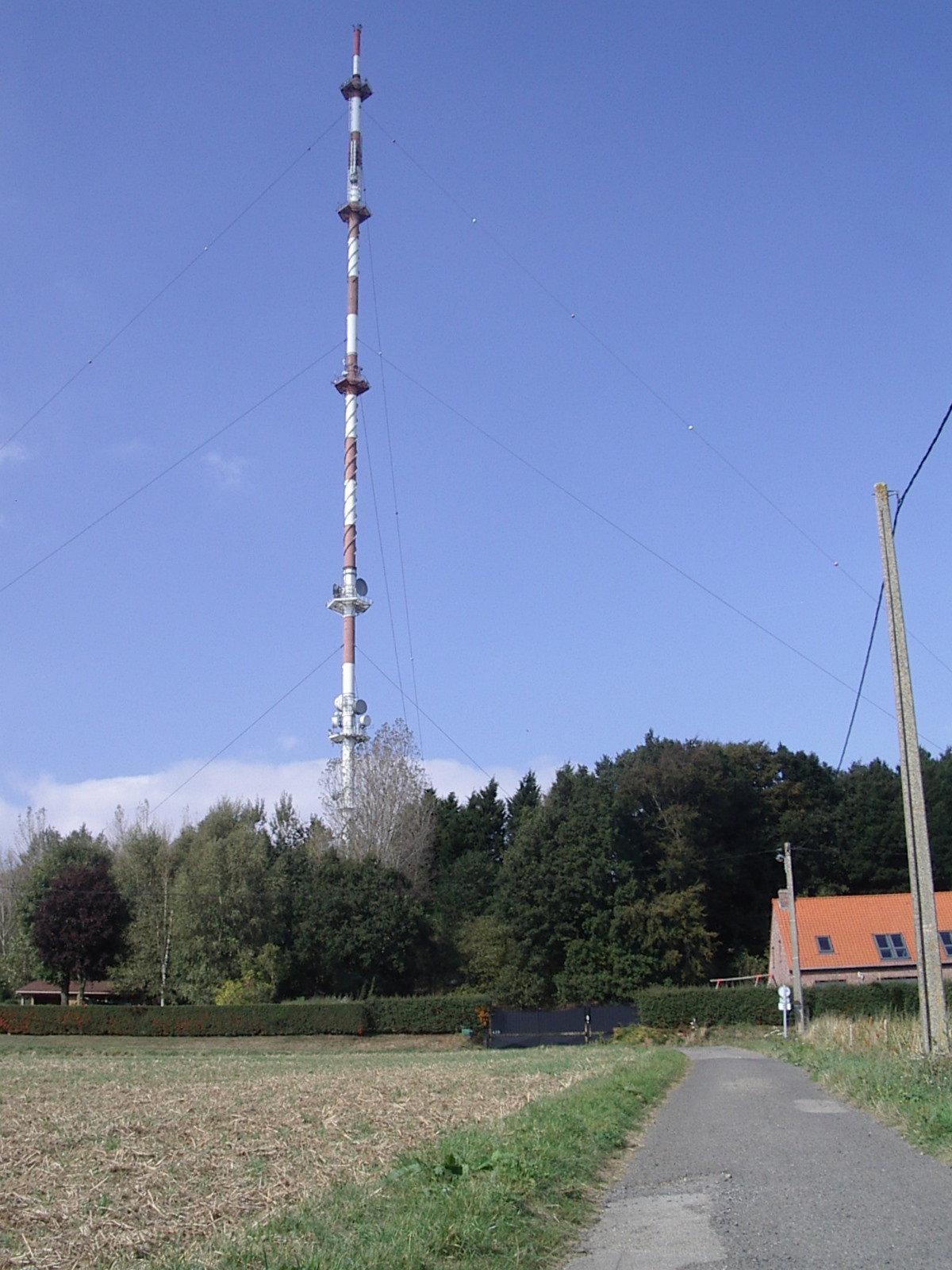 Emetteur de TDF lieu-dit le Mont des Cats, Departement Nord (59)